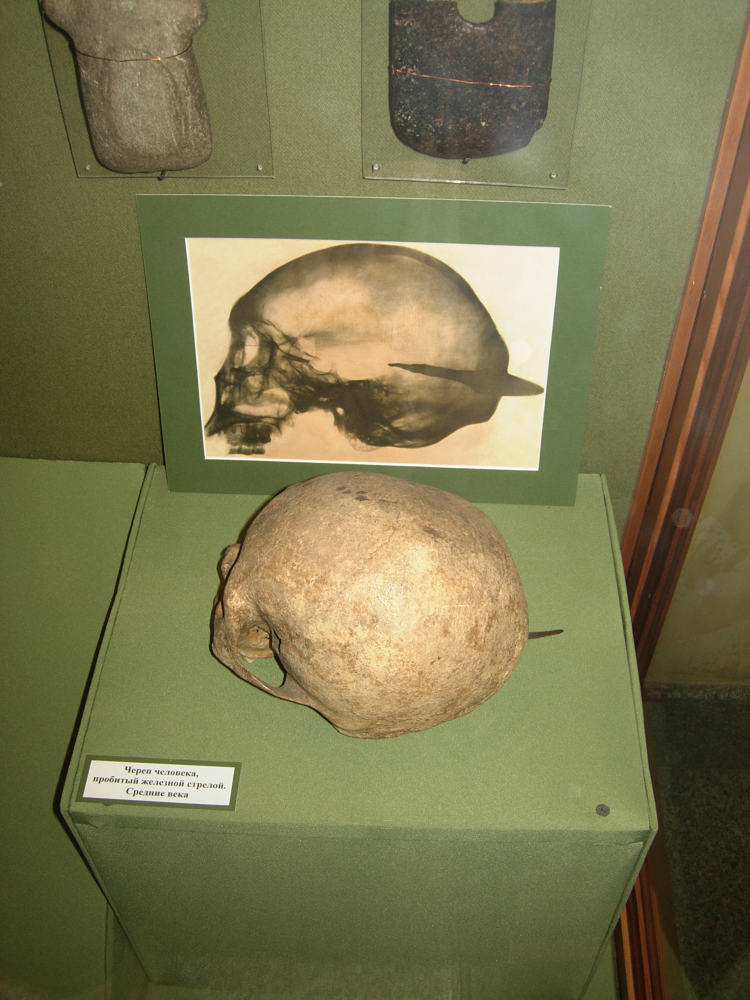 Череп человека, пробитый железной стрелой. Средние века. Из экспозиции Забайкальского краевого краеведческого музея им. А. К. Кузнецова